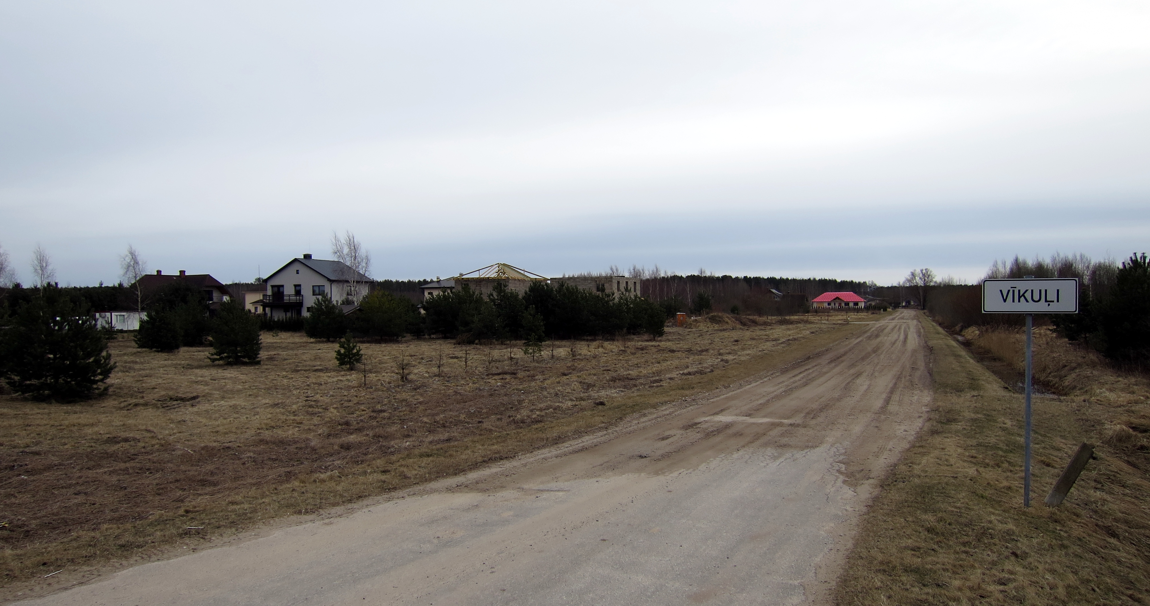 Vīkuļu ciems